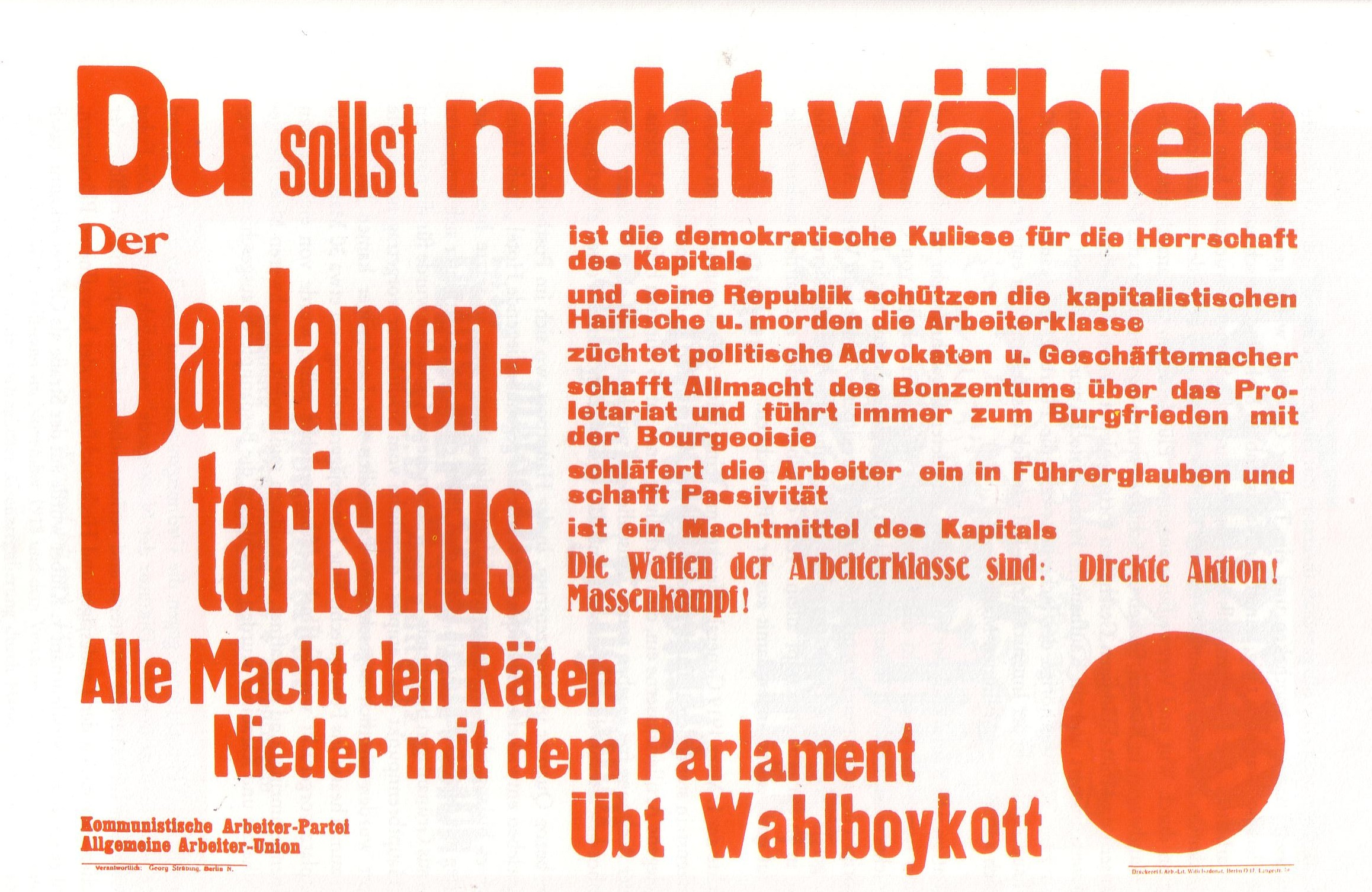 Wahlplakat der Kommunistischen Arbeiterpartei Deutschlands vor der Reichstagswahl am 6. Juni 1920